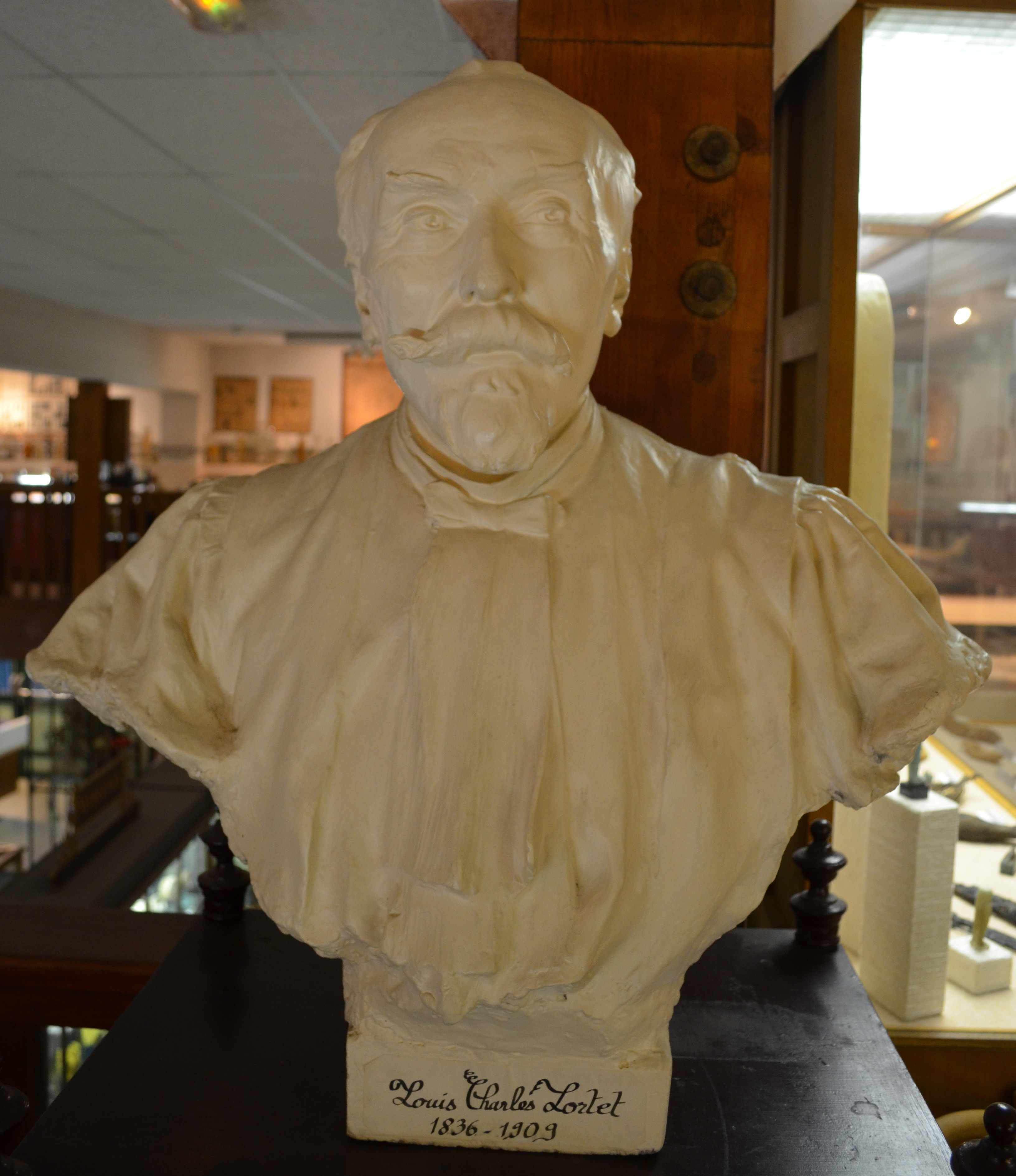 Buste de Louis Charles Émile Lortet au musée Testut-Latarjet.